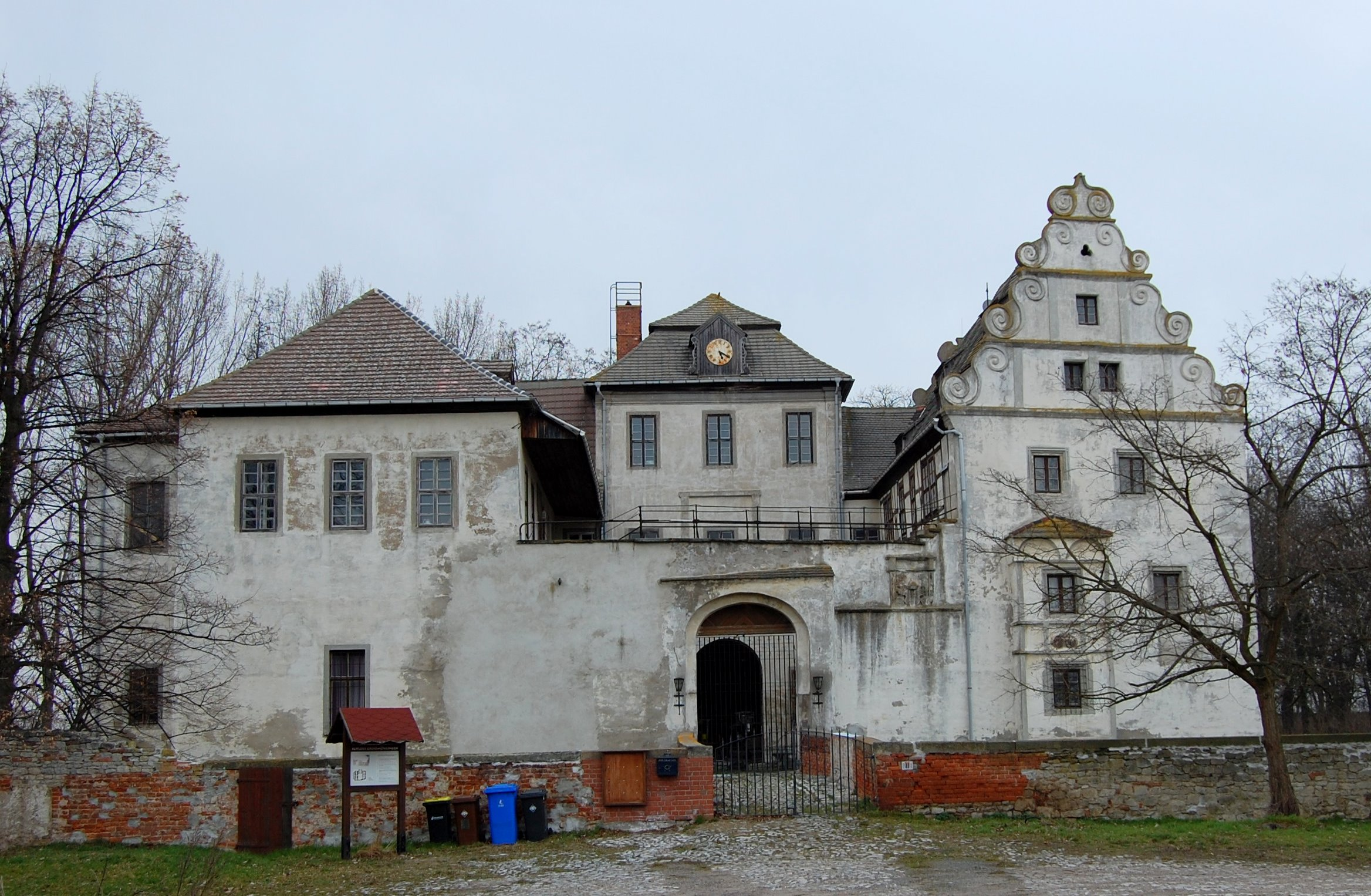 Schloss in Großmühlingen, Sachsen-Anhalt, Südseite